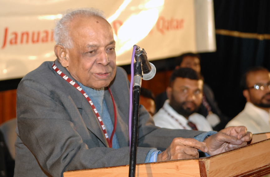 ഖത്തറിലെ ഇന്ത്യൻ ഫ്രിറ്റെർനിറ്റി ഫോറം (IFF)രൂപീകരണ യോഗത്തിൽ നിന്നുള്ള ചിത്രം